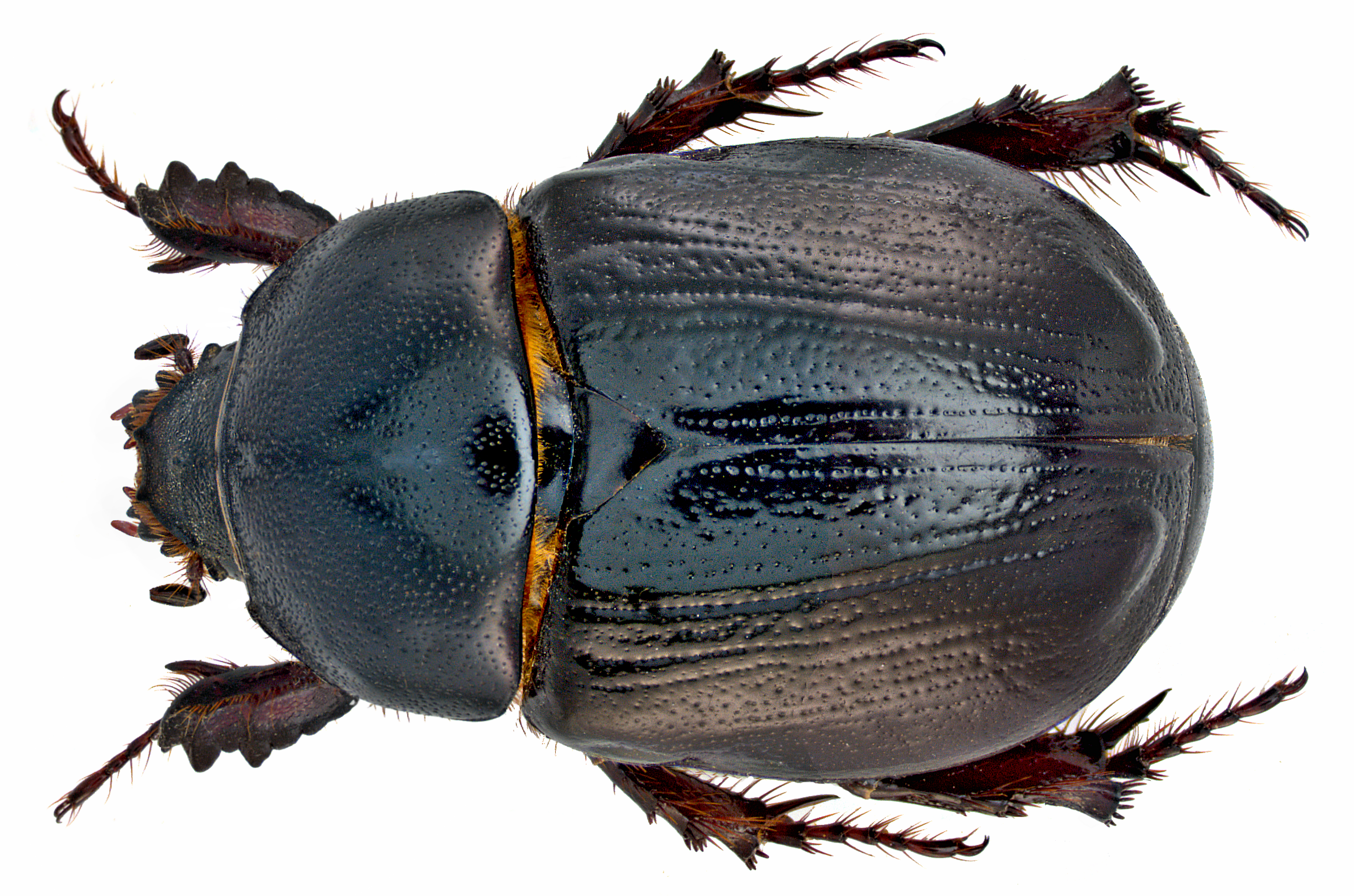 Family: Scarabaeidae Size: 23 mm Origin: Cyprus, Asia Minor Location: Cyprus, Larnaca Distr., Alaminos, environment Club Aldiana leg.det. U.Schmidt, 4.-14.V.2014 Photo: U.Schmidt, 2014